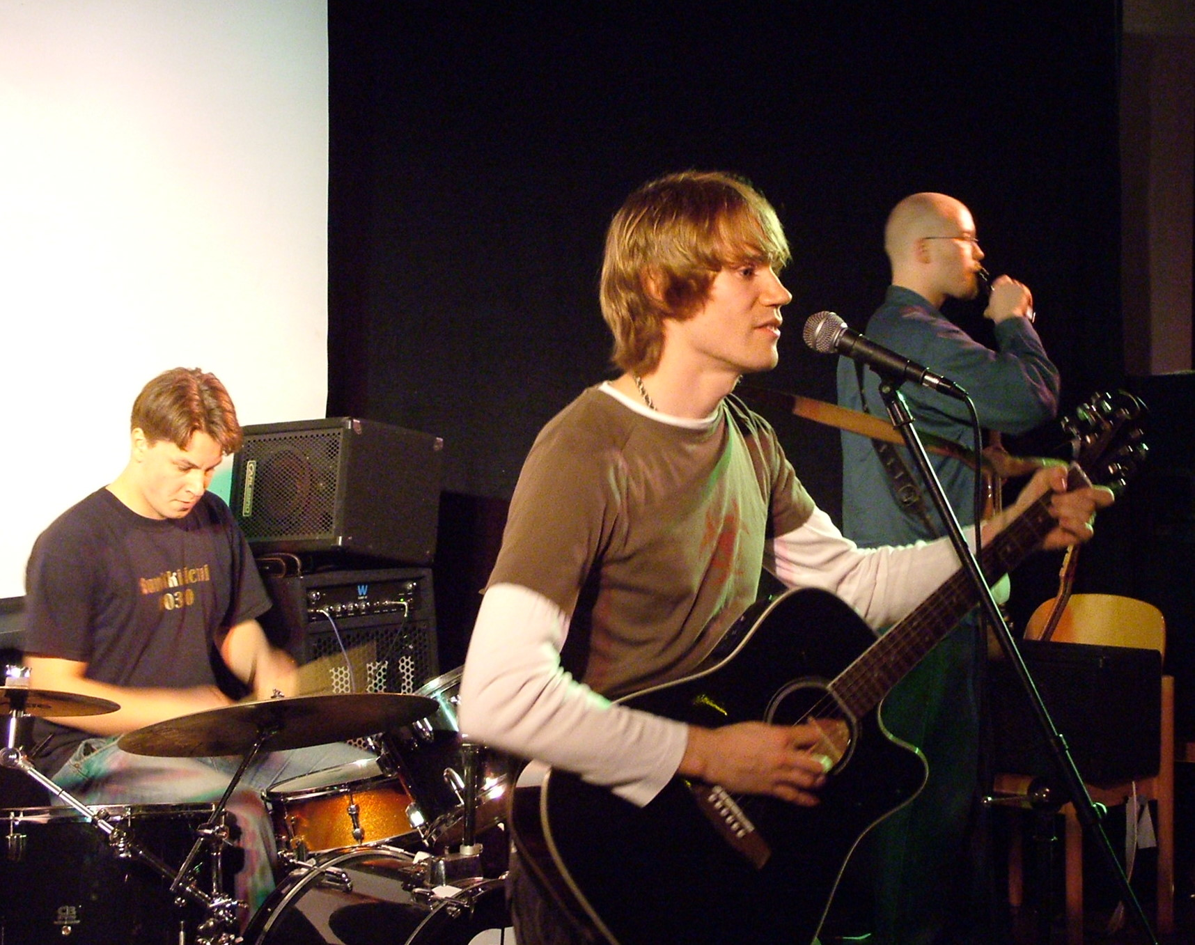 Dolchamar (kun Patrik Austin, mezo), dum Internacia Semajno de GEJ, Wewelsburg